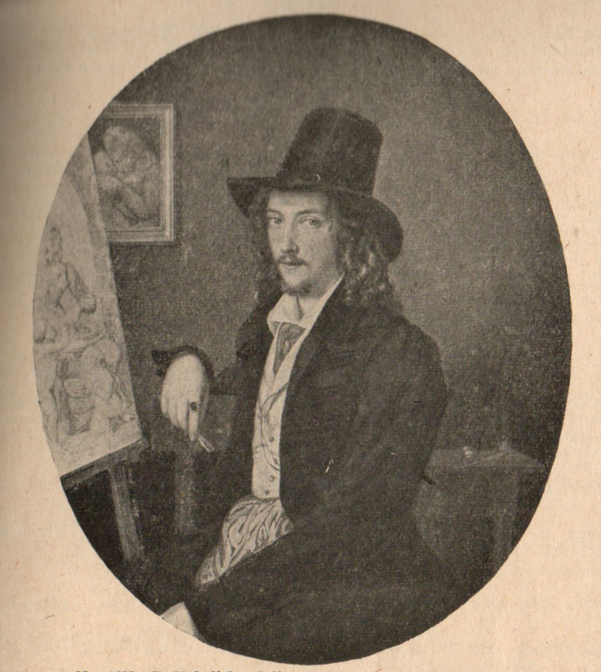 Selbstporträt Gustav Nehrlichs